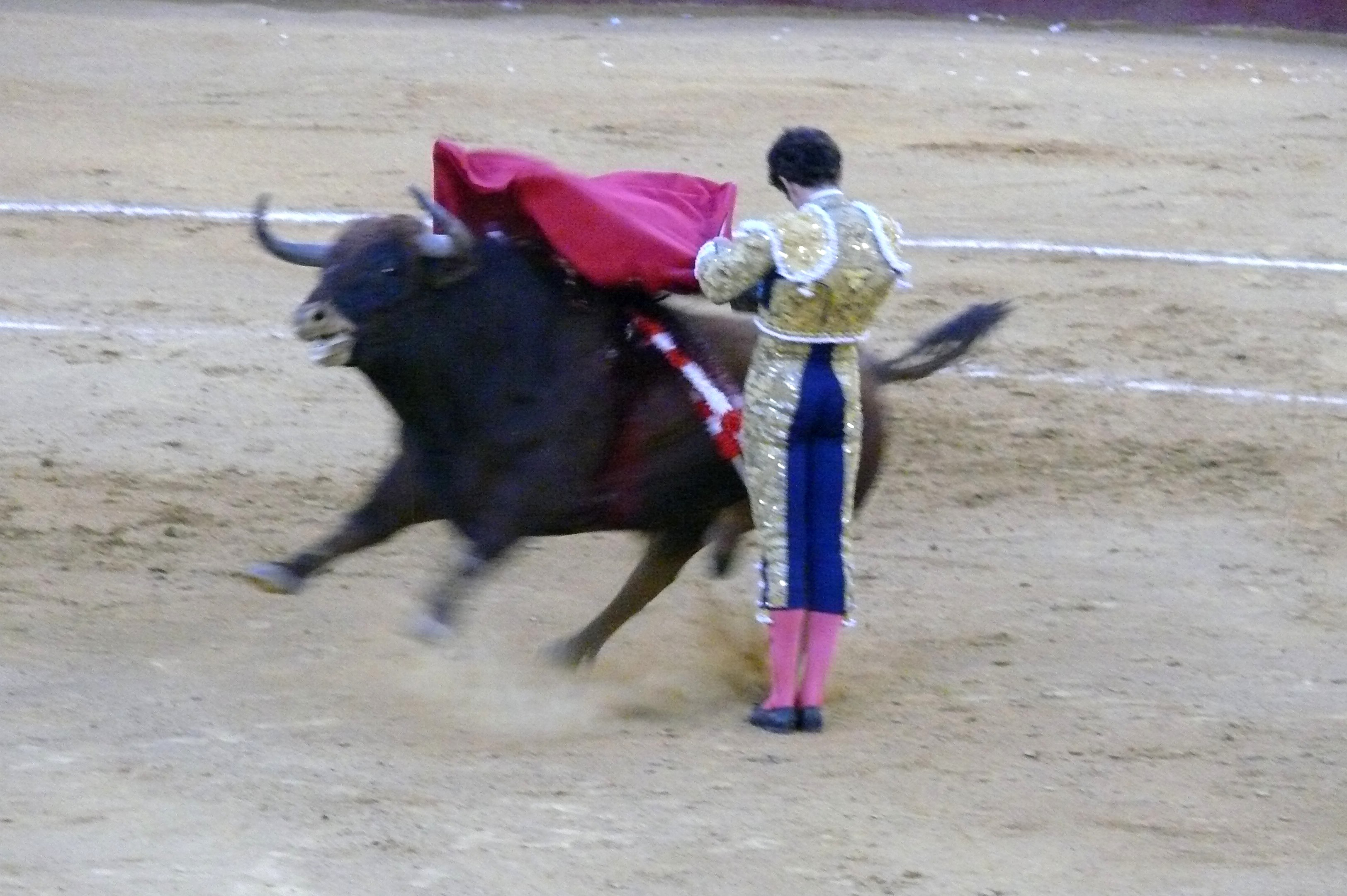 Estatuario de José Tomás en Almería (agosto 2008).